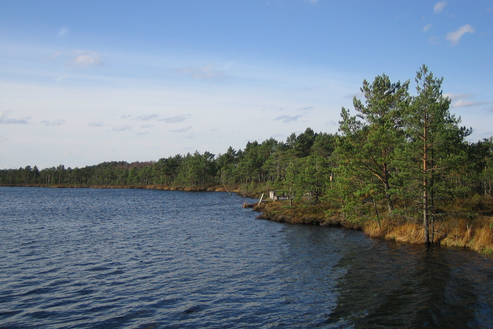 Öördi järve idakallas, Öördi raba, Sooma RP